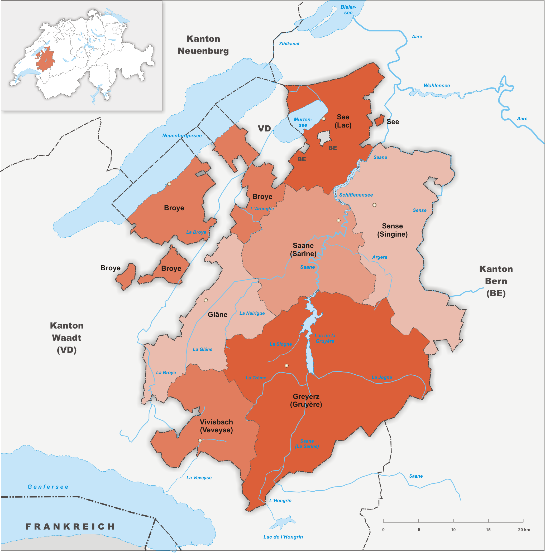 Bezirke des Kanton Freiburg